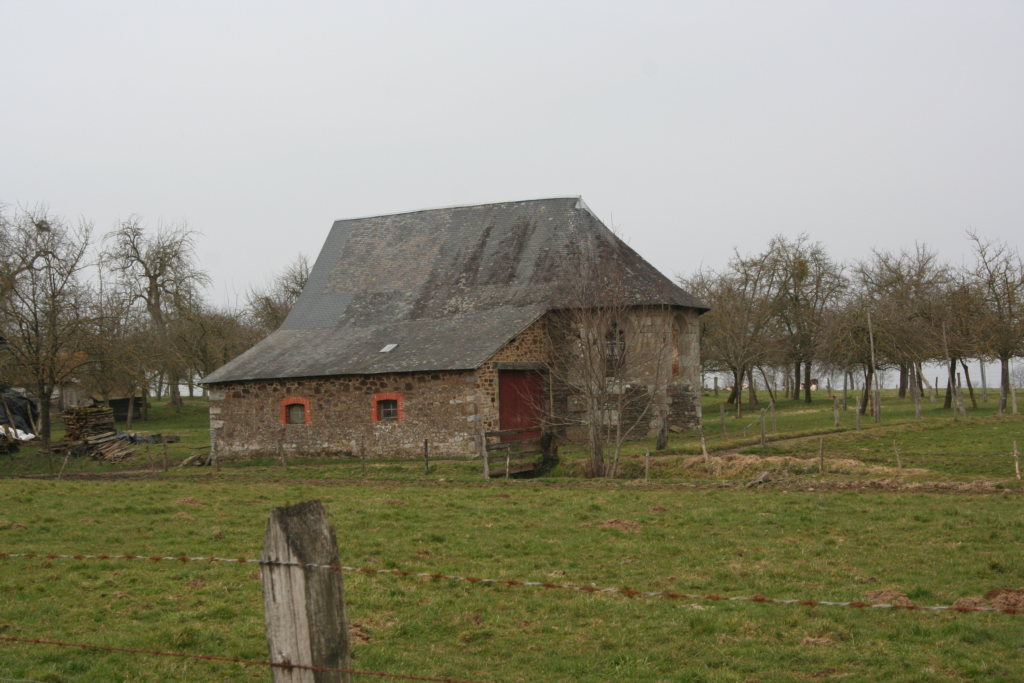 Reste de la chapelle de la seigneurie d'Ouessey à Le Teilleul, Manche, France